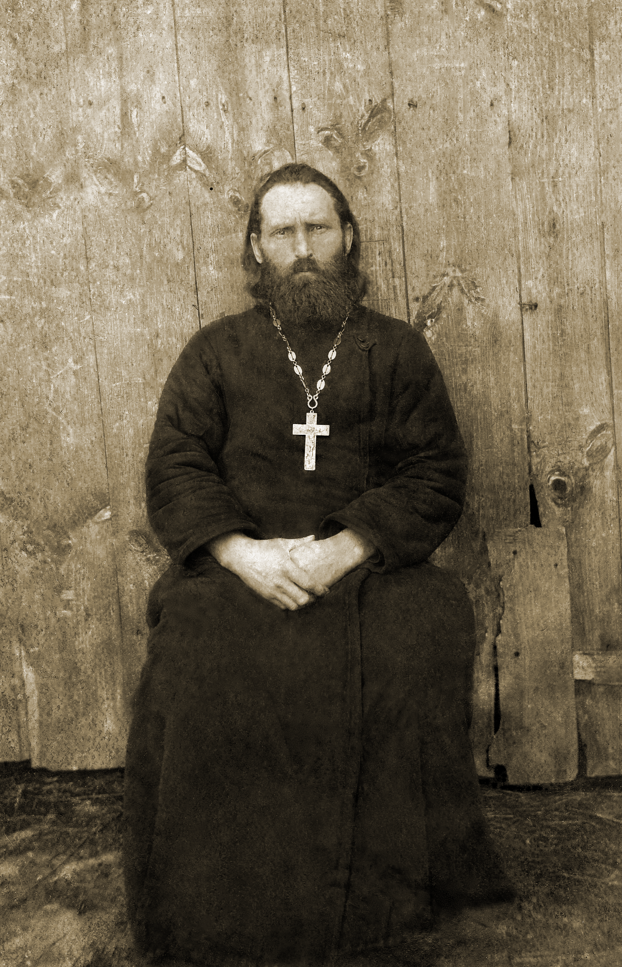 Виноградский Александр Павлович. Священник села Белавино Вачского района Горьковской области